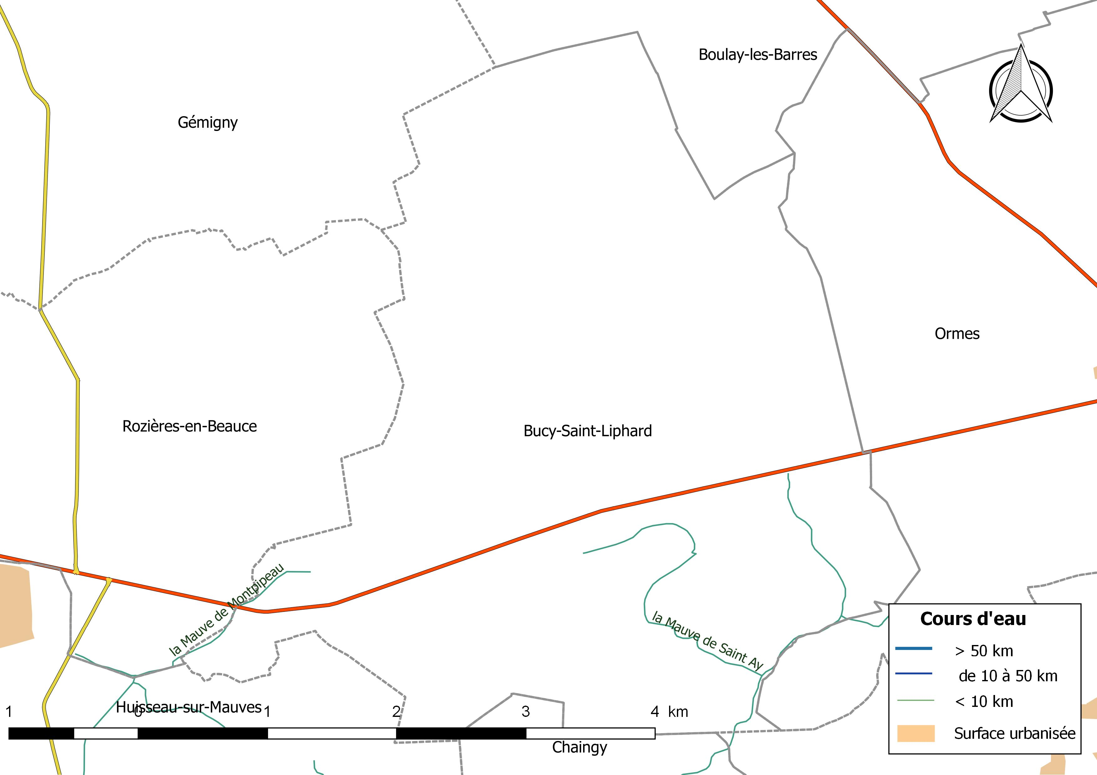 Carte du réseau hydrographique de la commune de Bucy-Saint-Liphard (France).